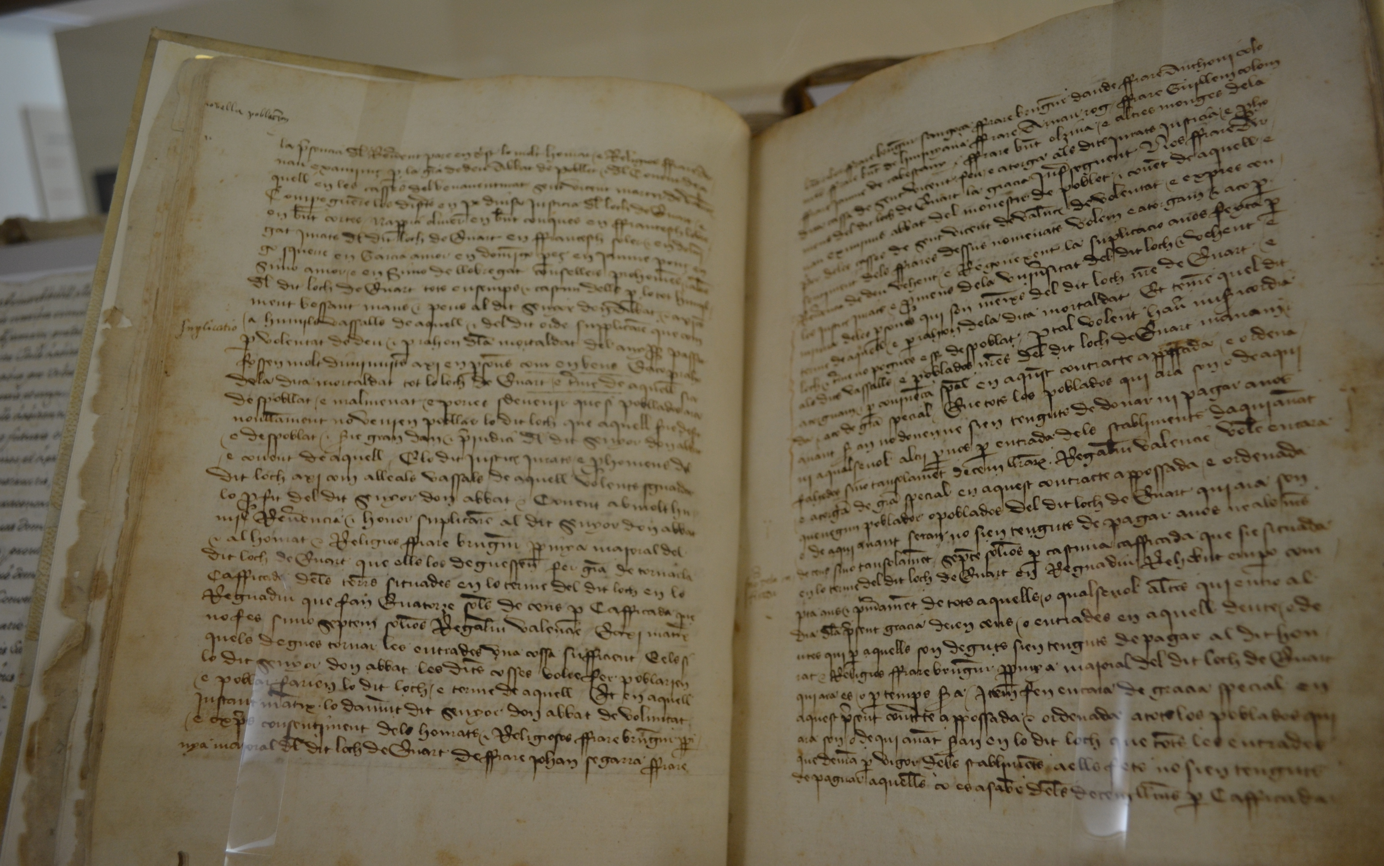 Fra Arnau d'Eixamús, abat del monestir de Poblet, com a senyor dels llocs de Quart de Poblet i Aldaia, reforma alguns capítols de la carta de poblament del dit lloc de Quart de 1334, que fue atorgada després de l'expulsió de la població musulmana, per a repoblar-lo de nou, ja que s'havia despoblat a causa de la pesta de 1348 (18 de novembre de 1349). ARV: Fons Pere Mª Ort, Llivre de privilegis i ordenacions del Priorat de Sant Vicent de la Roqueta (còpia de 24 d'octubre de 1369). Arxiu del Regne de València.